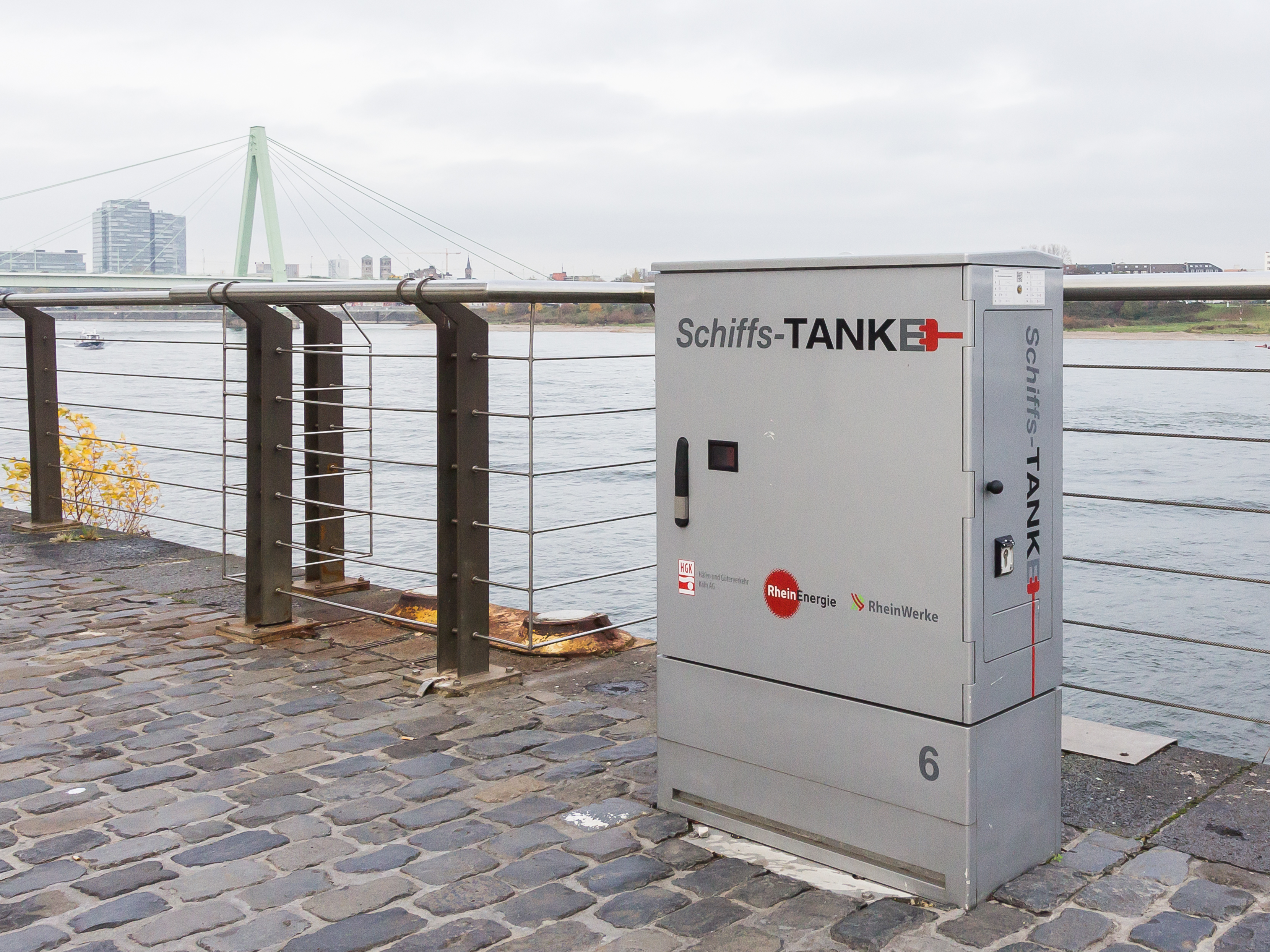 Landstromversorgung (Cold Ironing) Schiffs-TankE im Rheinauhafen Köln. Anbieter: RheinEnergie